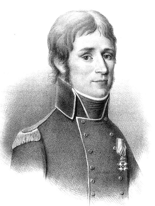 Gustaf af Klint (1771-1840)